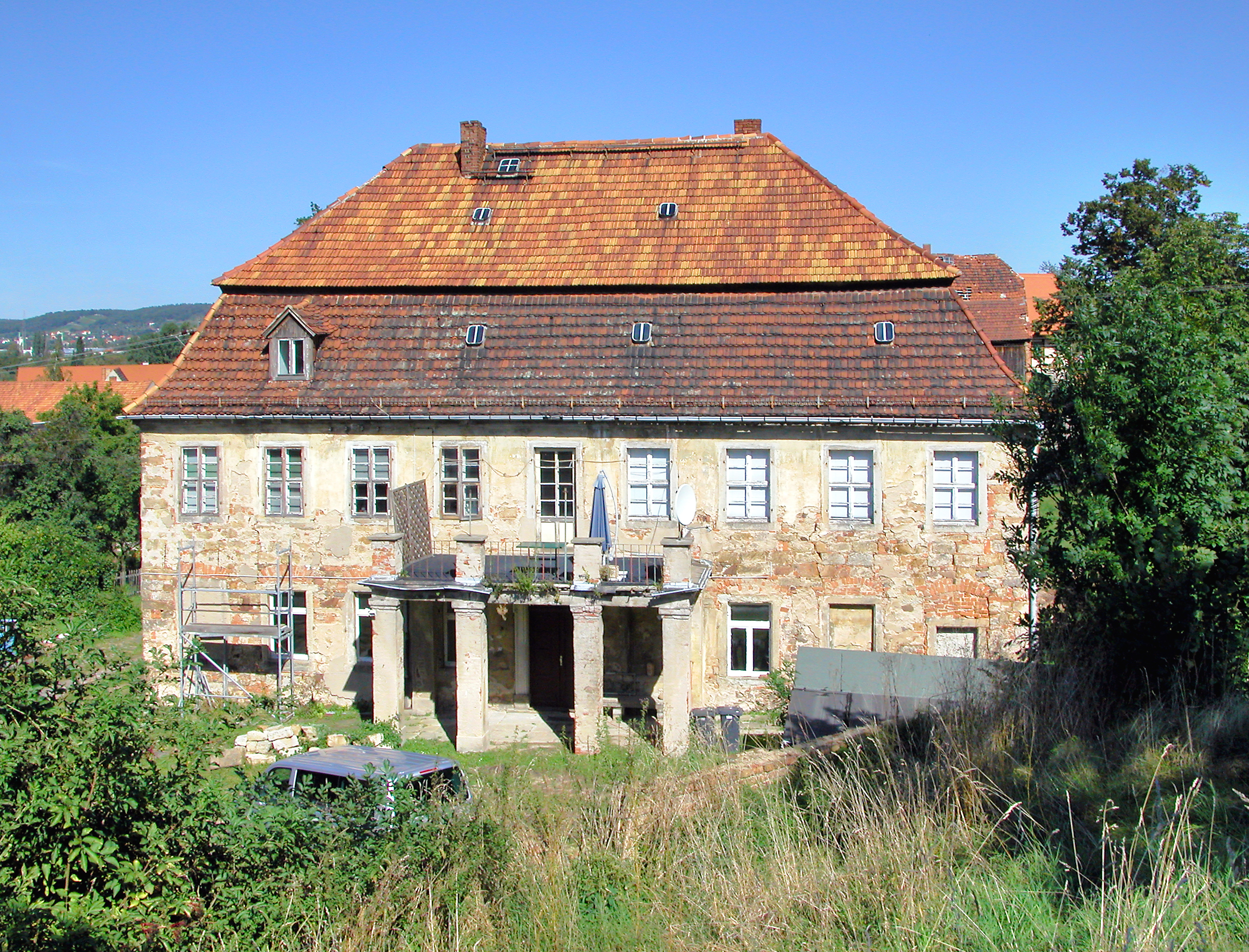 06.09.2007 01665 Wildberg zu Gauernitz (Klipphausen): Herrenhaus (1747) von Süden. [DSCN29380.TIF]20070906325DR.JPG(c)Blobelt